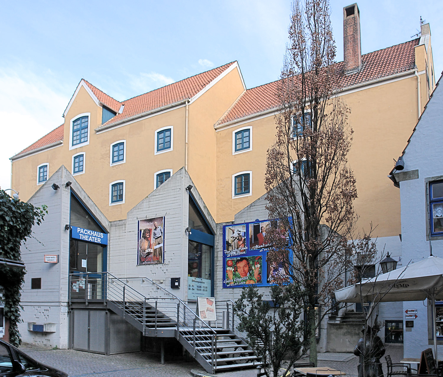 Bremen: Packhaus-Theater im SchnoorDas abgebildete Objekt ist ein geschütztes Kulturdenkmal in der Freien Hansestadt Bremen, mit der Nr. 1368 beim Landesamt für Denkmalpflege registriert.